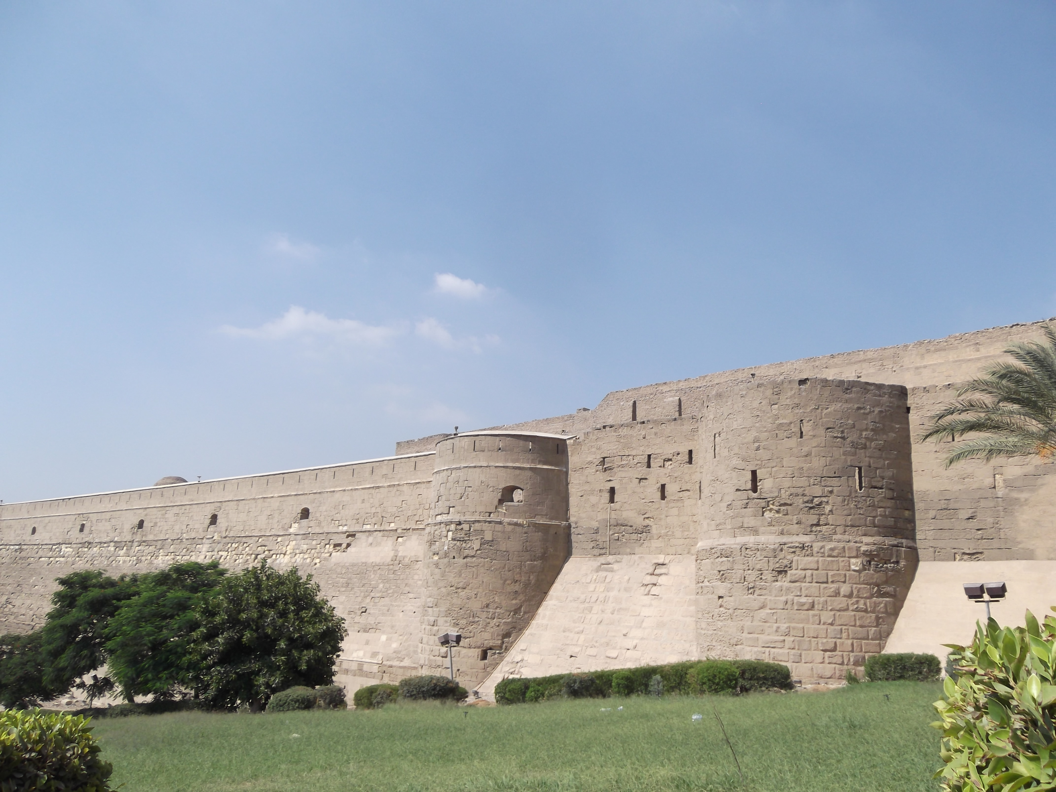 قلعة صلاح الدين الأيوبي بالقاهرة.